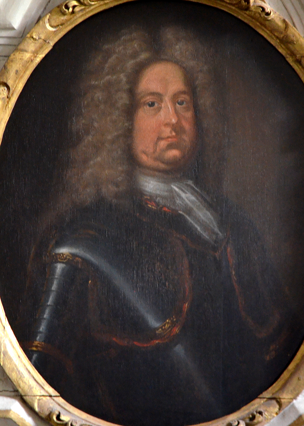 Ölgemälde mit einem Brustbild des Obristen, Leutnants und Amtsvogts von Burgwedel „Ludolf Henning von Eltz“ in der Kirche St. Petrus in Burgwedel ...